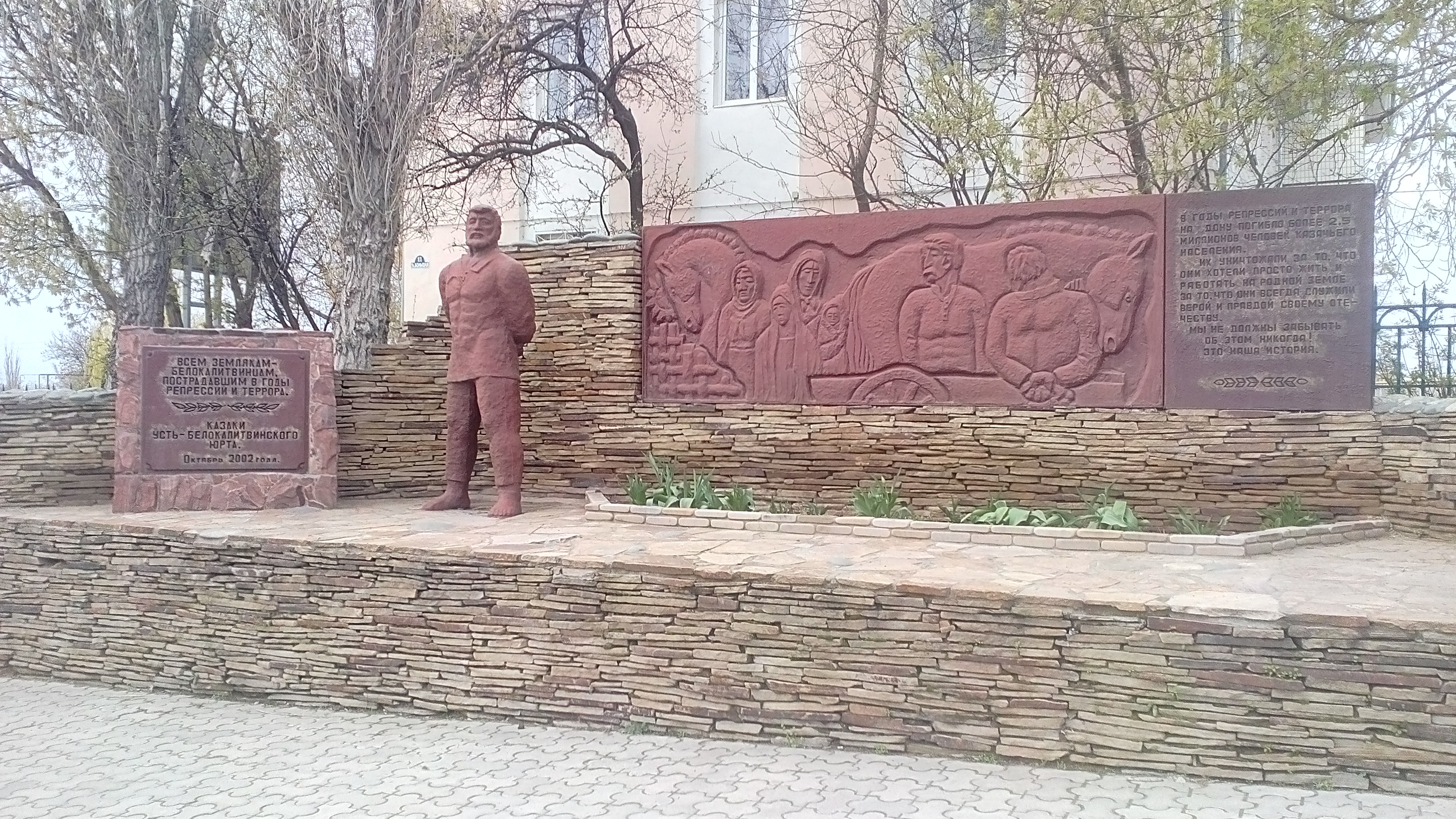 Белая Калитва: памятник жертвам террора и реперессий